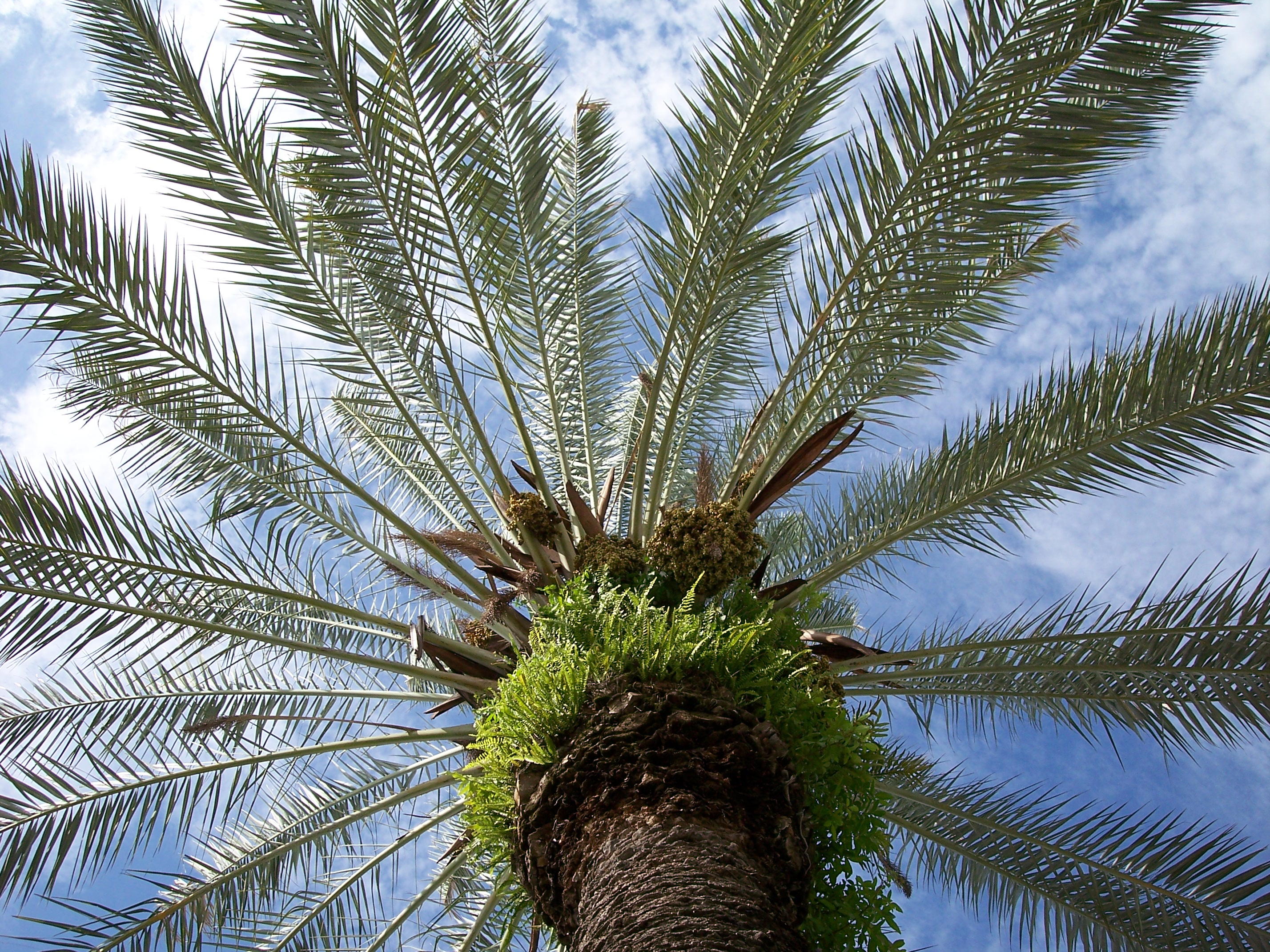 Palm Tree